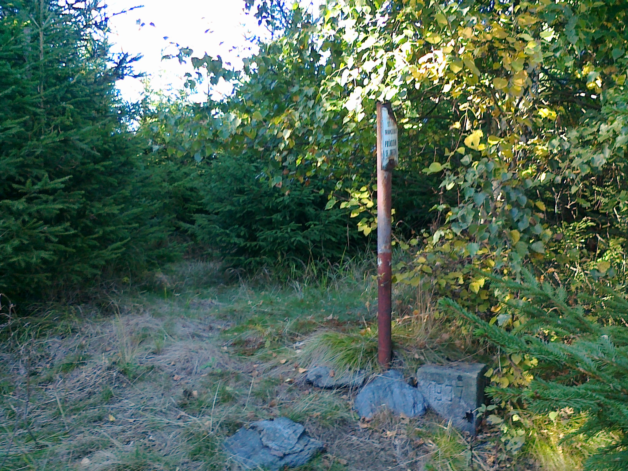 Punkt geodezyjny na górze Vysoká hora - 1031 m n.p.m.